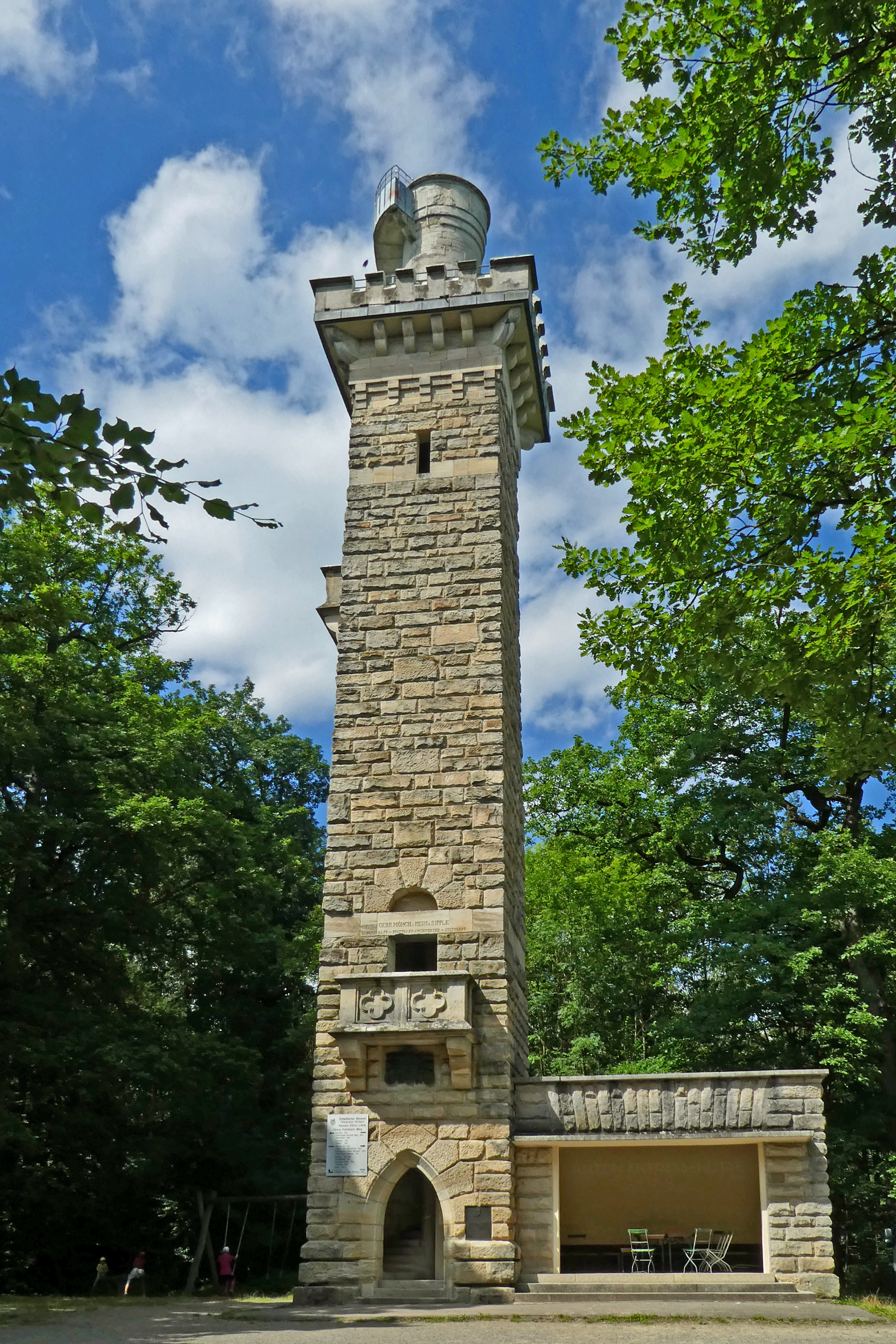 Der Kernenturm im Schurwald